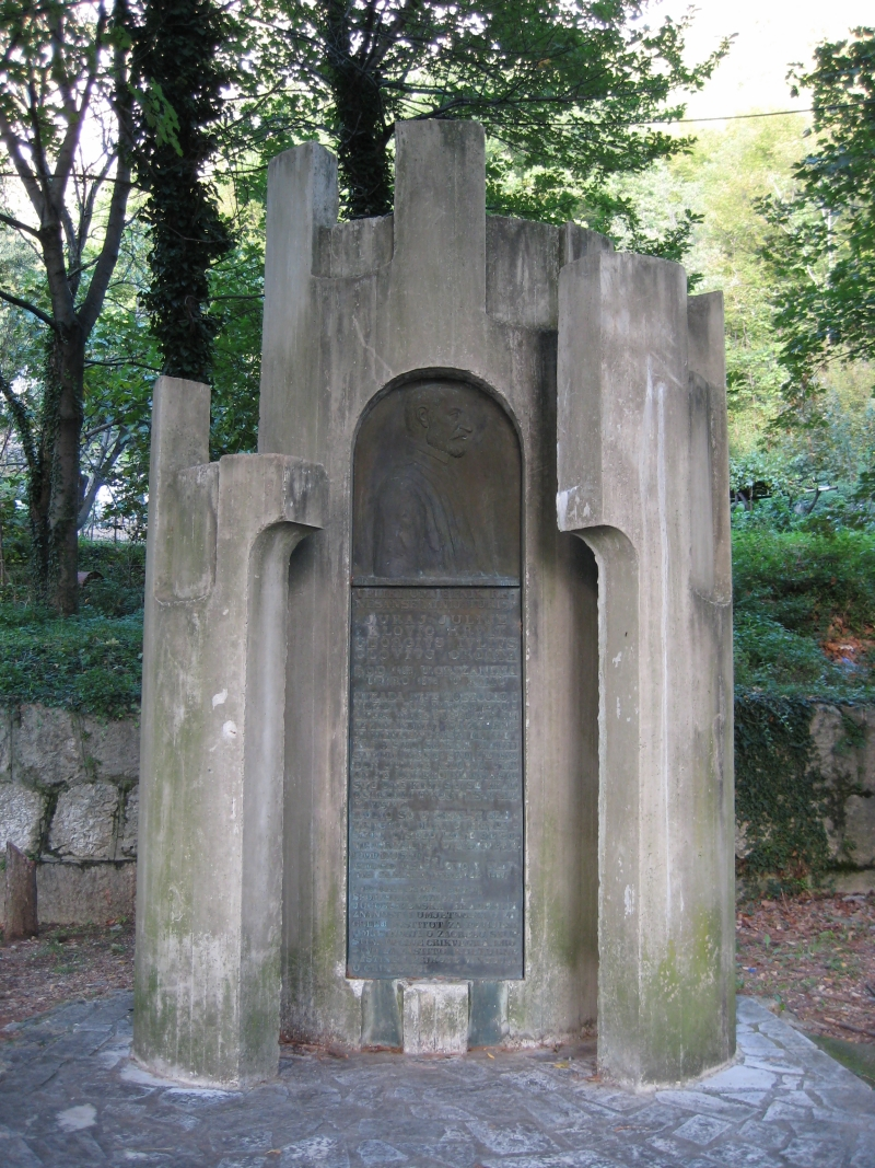 Spomenik Juliju Klovicu, Grižane, Croatia